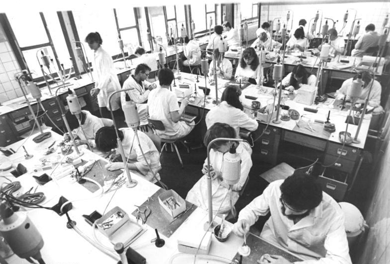 Leipzig, Universität, Zahnmedizin, Labor ADN-ZB Grubitzsch 30.11-84 Leipzig: Zum 575. Jahrestag der Karl-Marx-Universität (2.12.84)-Eine Sektion Stomatologie existiert seit dem Herbst dieses Jahres an der Leipziger Karl-Marx-Universität. Zur Zeit studieren dort rund 600 Stomatologen. Etwa 100 Zahnärzte werden jährlich in die Praxis entlassen. Für die Studenten in der vorklinischen Ausbildung (Foto) ist der Weg dahin noch weit. Sie lernen am Phantom und bereiten sich so auf die Betreuung der Patienten vor. (siehe 2 und 3N)